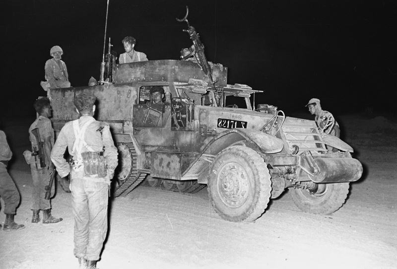 פעולות-תגמול, פשיטת לילה בחאן-יונס, מבצע "אלקיים", חבל"מ מכוח הפשיטה של גדוד 890 על משטרת חאן-יונס מבצע "אלקיים" בליל 30/8/55- 31/8/55. הזחל"מ חמוש בשני מקלעים בינויים זחל"מ מכח הפשיטה של גדוד 890 על משטרת חאן-יונס מבצע "אלקיים" בליל 30.08.55-31.08.55.הזחל"מ חמוש בשנימקלעים בינוניים מסוג "בזה" . מקום הצילום : חאן-יונס.